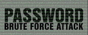 Монгол: Зураг-2